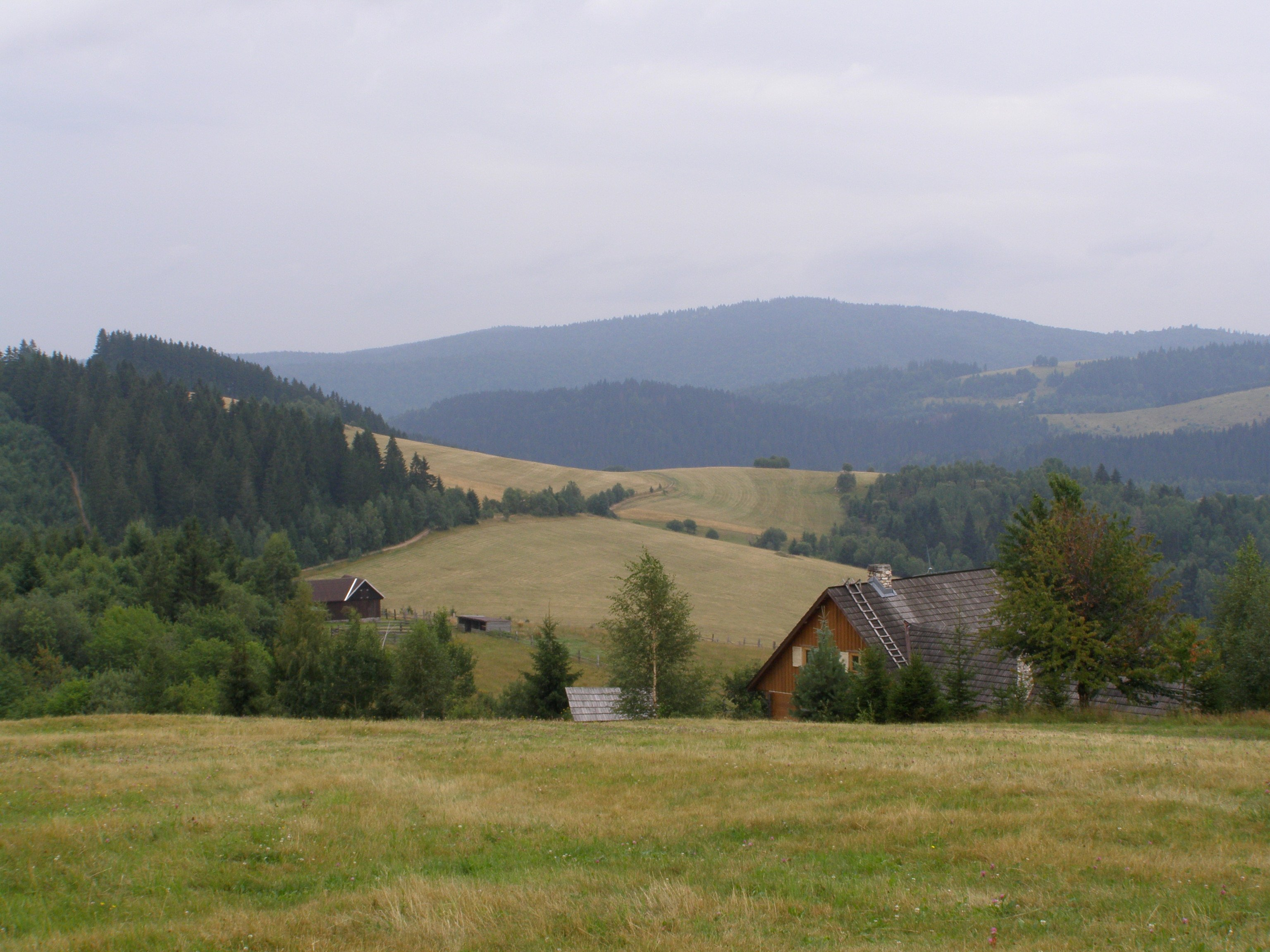 Slovenské rudohoří, Veporské vrchy, Balocké vrchy, pohled z úbočí vrcholu Dlhý grúň (1062 m) na jihovýchod